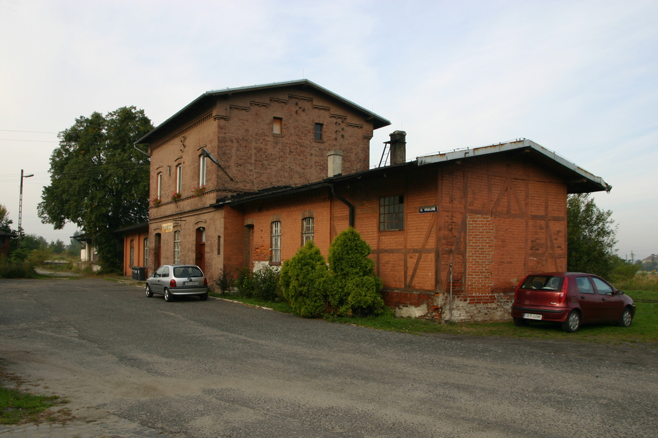 Dworzec w Krapkowicach.